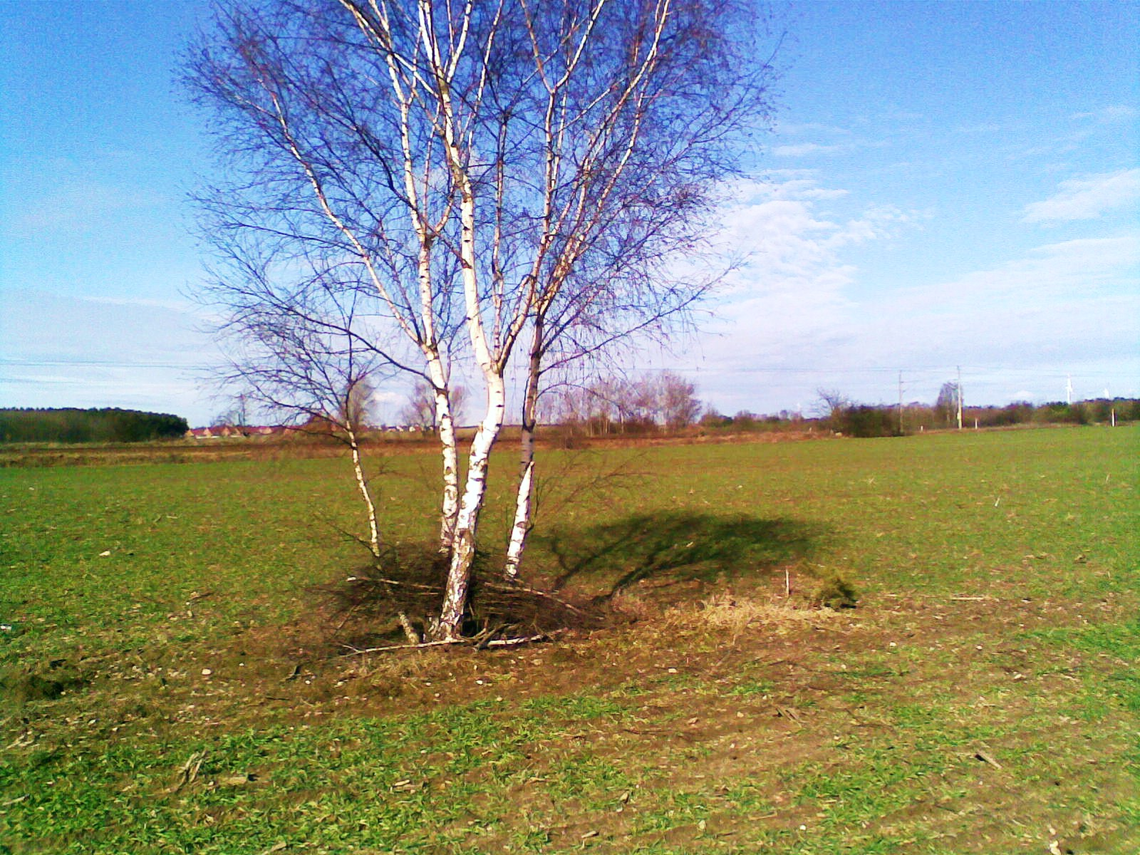 Die Panke-Quelle. Der berühmte Berliner Fluss nimmt in Bernau seinen Ursprung. Zunächst verläuft die Panke in einem Graben, der dem sprudelnden Bach, der im 13. Jahrhundert die Bernauer Stadtmauer umfloss nicht mehr das Wasser reichen kann.